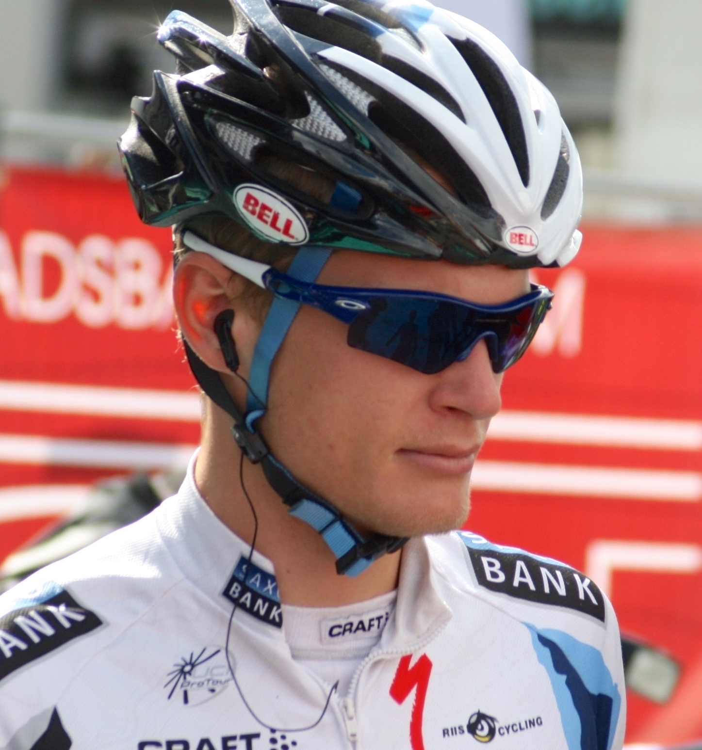 Matti Breschel au E3 Prijs 2009